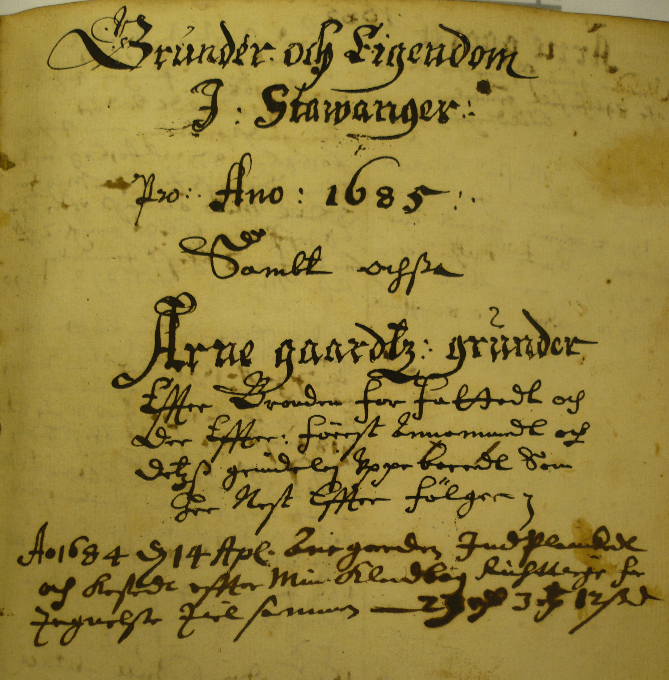 Framsiden av Morten Seehusens jordebok over eiendommer i Stavanger som ble påbegynt i 1685, og som også omfatter Arnegård.